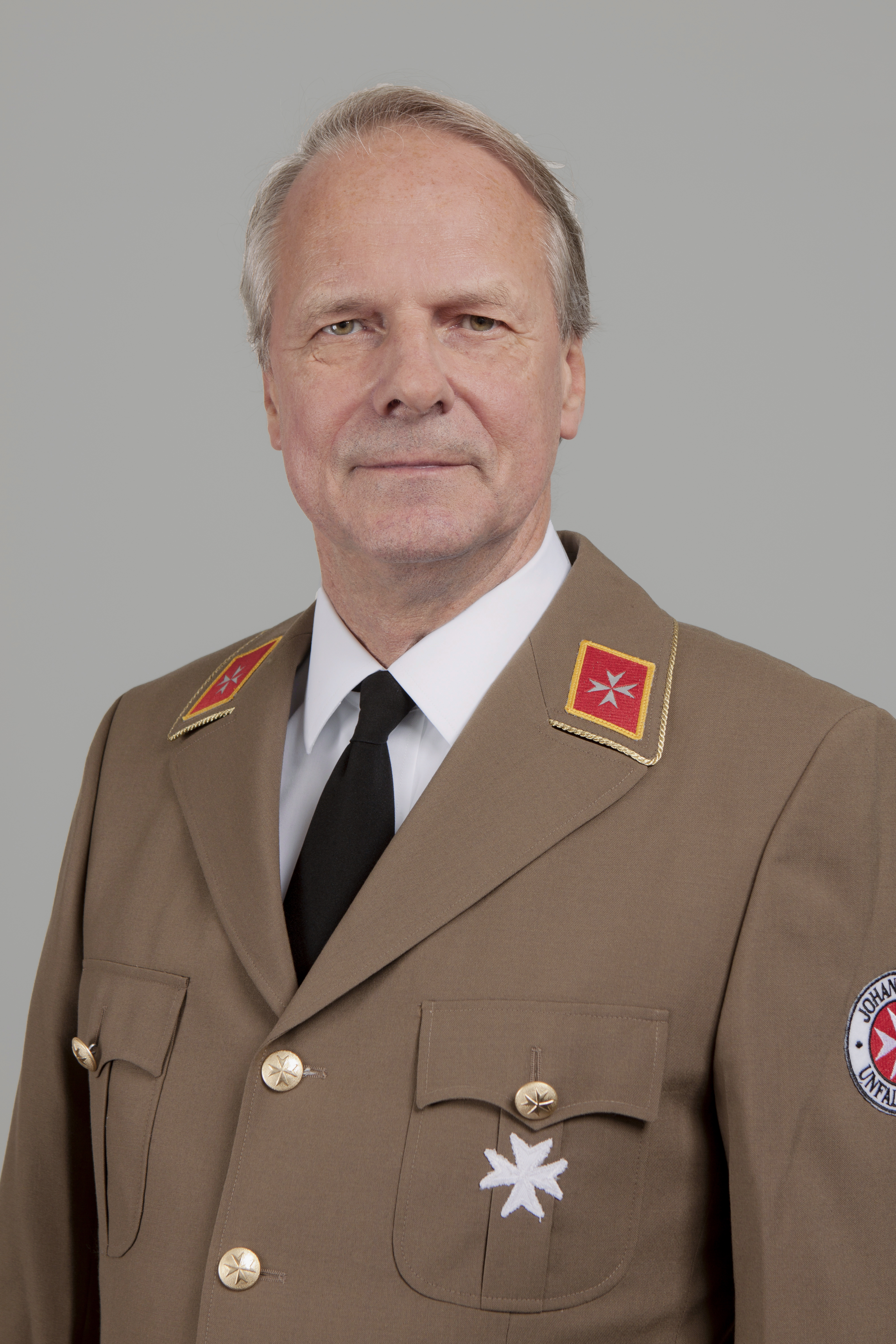 Hubertus von Puttkamer als ehrenamtlicher Landesbeauftragter der Johanniter-Unfall-Hilfe Nord.